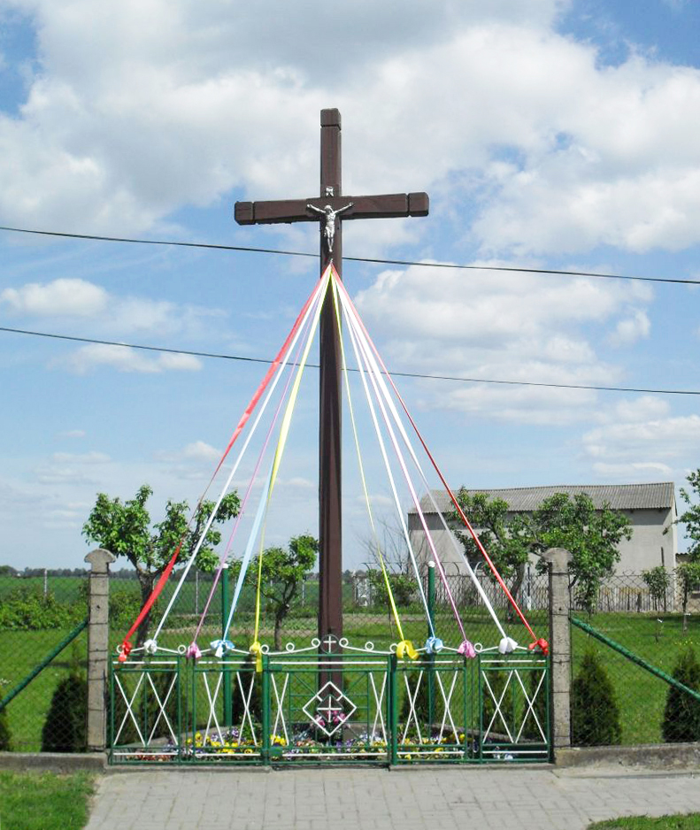 Przydrożny krzyż w Suponinie.